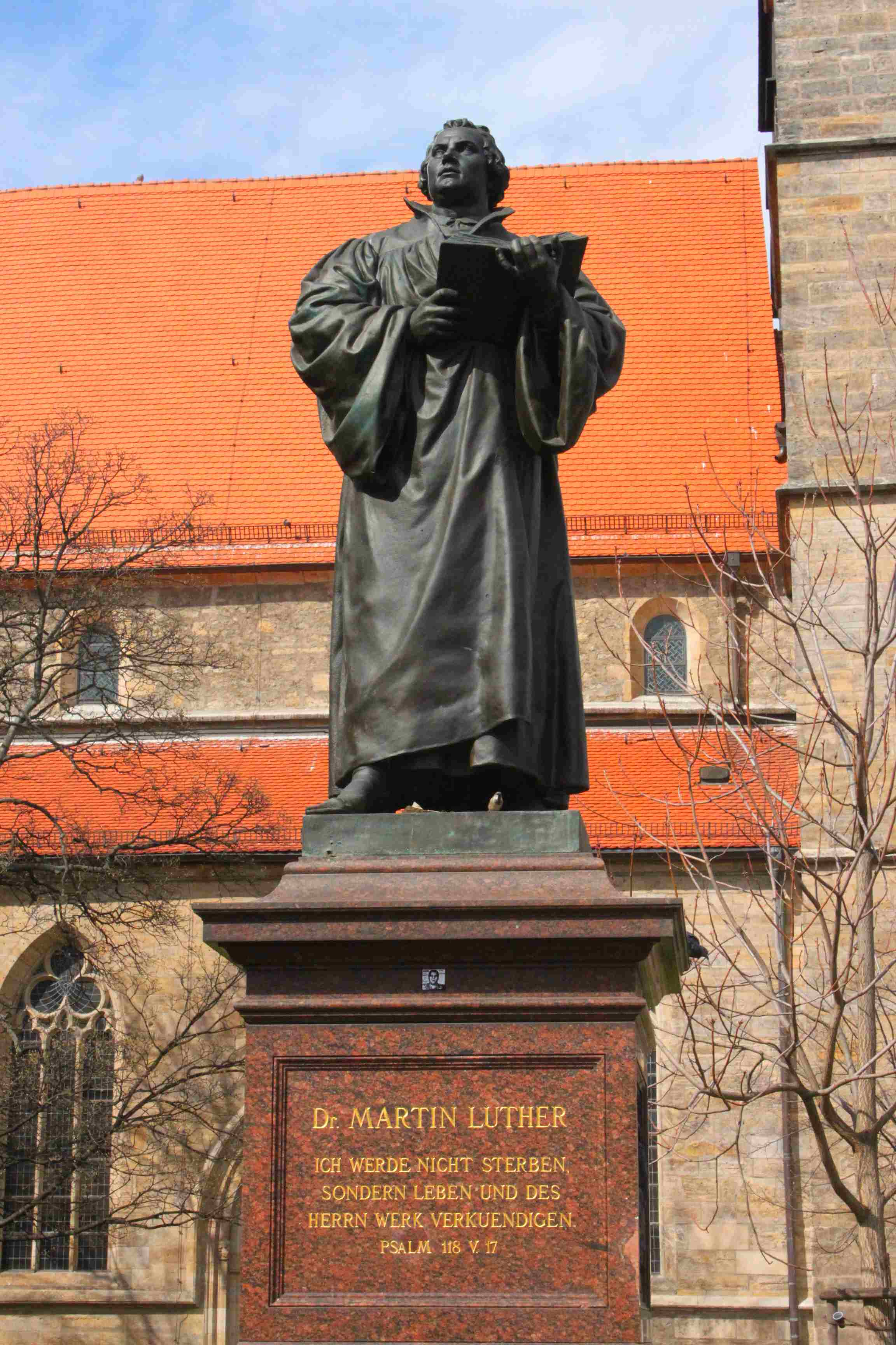 Martin-Luther-Denkmal (1889) vor der Kaufmannskirche am Anger.